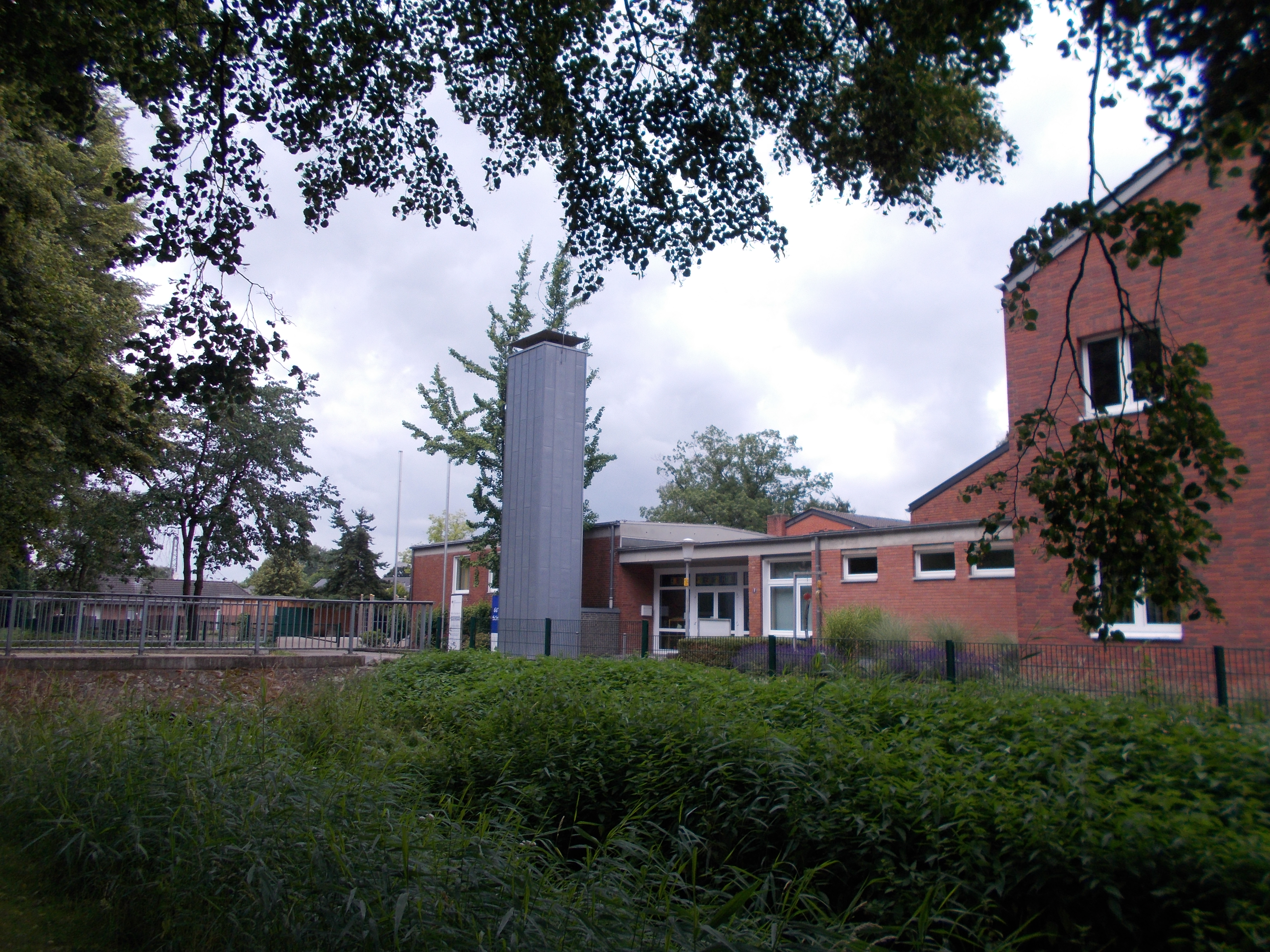 Die Christophorusschule Kranenburg wurde auf dem ehemaligen Grundstück des Kranenburger Stadtschlosses gebaut.